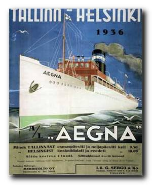 Werbung für das Fährschiff Aegna zwischen Tallinn und Helsinki